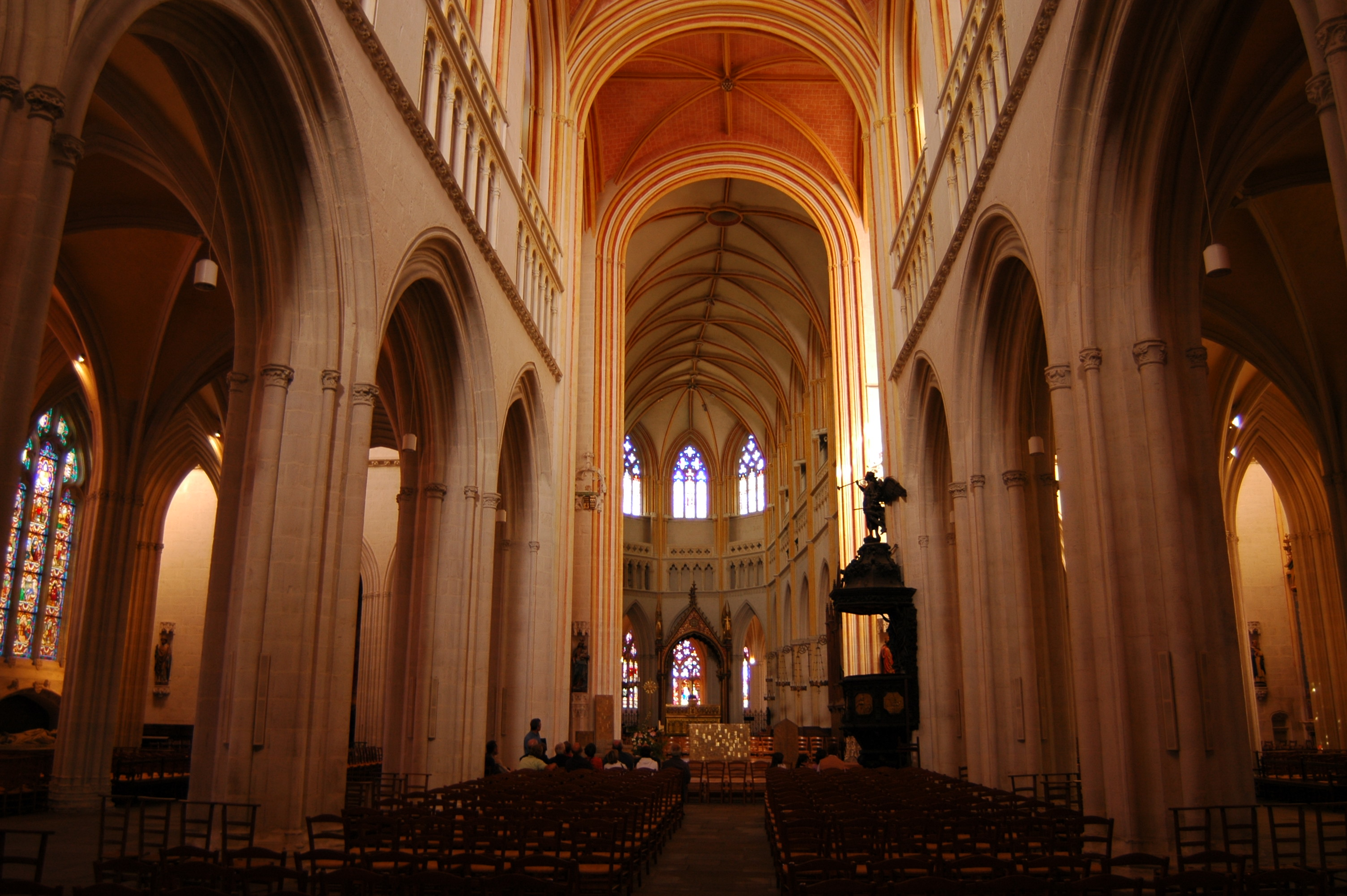 L'intérieur de la cathédrale Saint Corentin à Quimper. La nef est légèrement courbe (elle s'incurve au-delà du transept), en raison de la non-rectitude de l'effleurement rocheux sur lequel elle s'appuie. Les colonnes et le plafond polychrome ont été peint d'après les traces de polychromie retrouvées sous les enduits lors de la campagne de restauration.